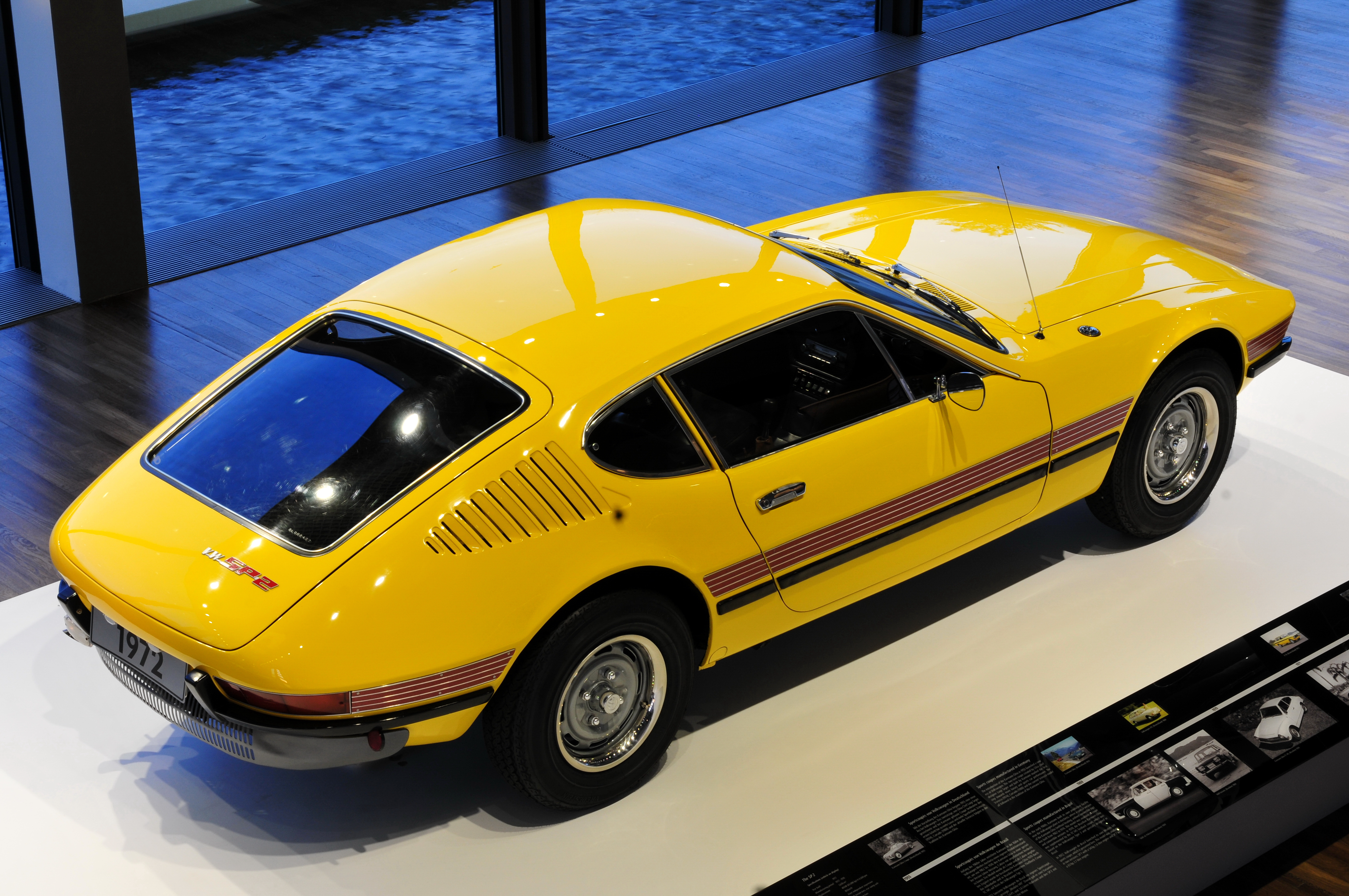 Zeithaus in der Autostadt Wolfsburg